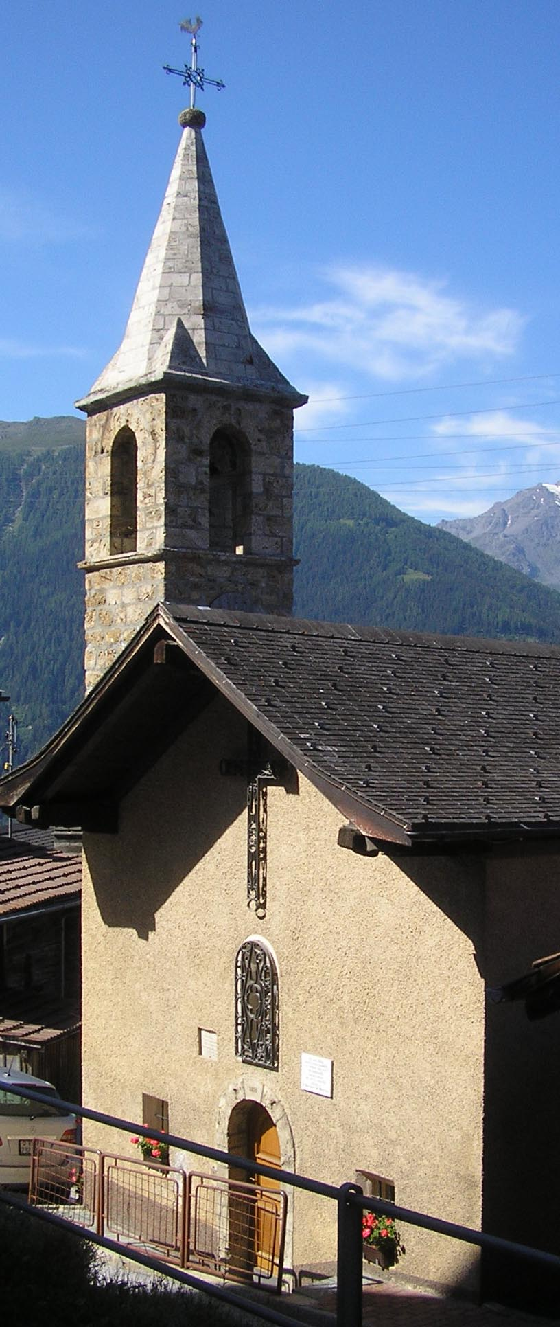 Chapelle de Suen (commune de Saint-Martin, Valais)